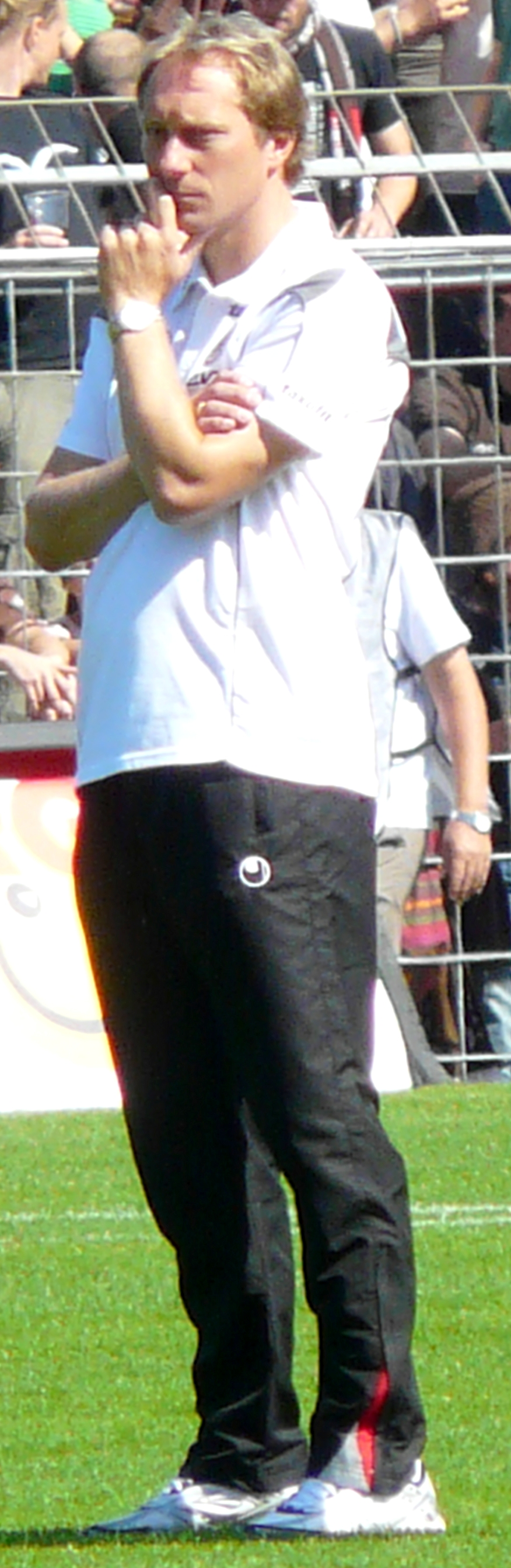 Jürgen Luginger